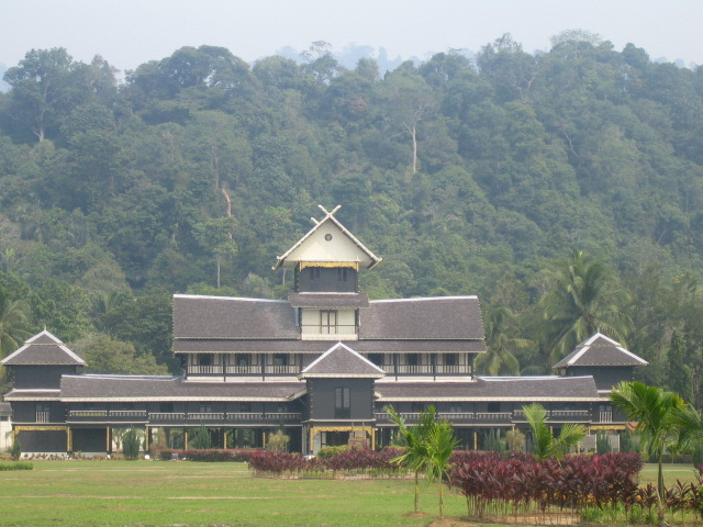 Kategori:Imej domain awam (obsolete) - by Kurosagi7